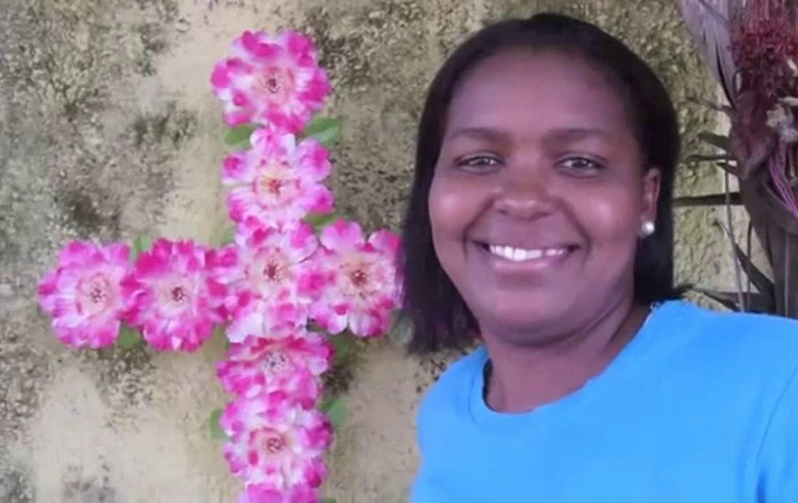 Fiesta Velorios de Cruz de Mayo en la población de Birongo